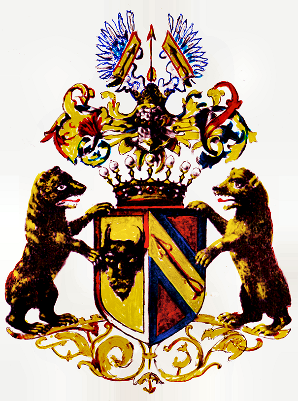 Wappen der Freiherren von Styrczea 1880, koloriert nach Vorlage